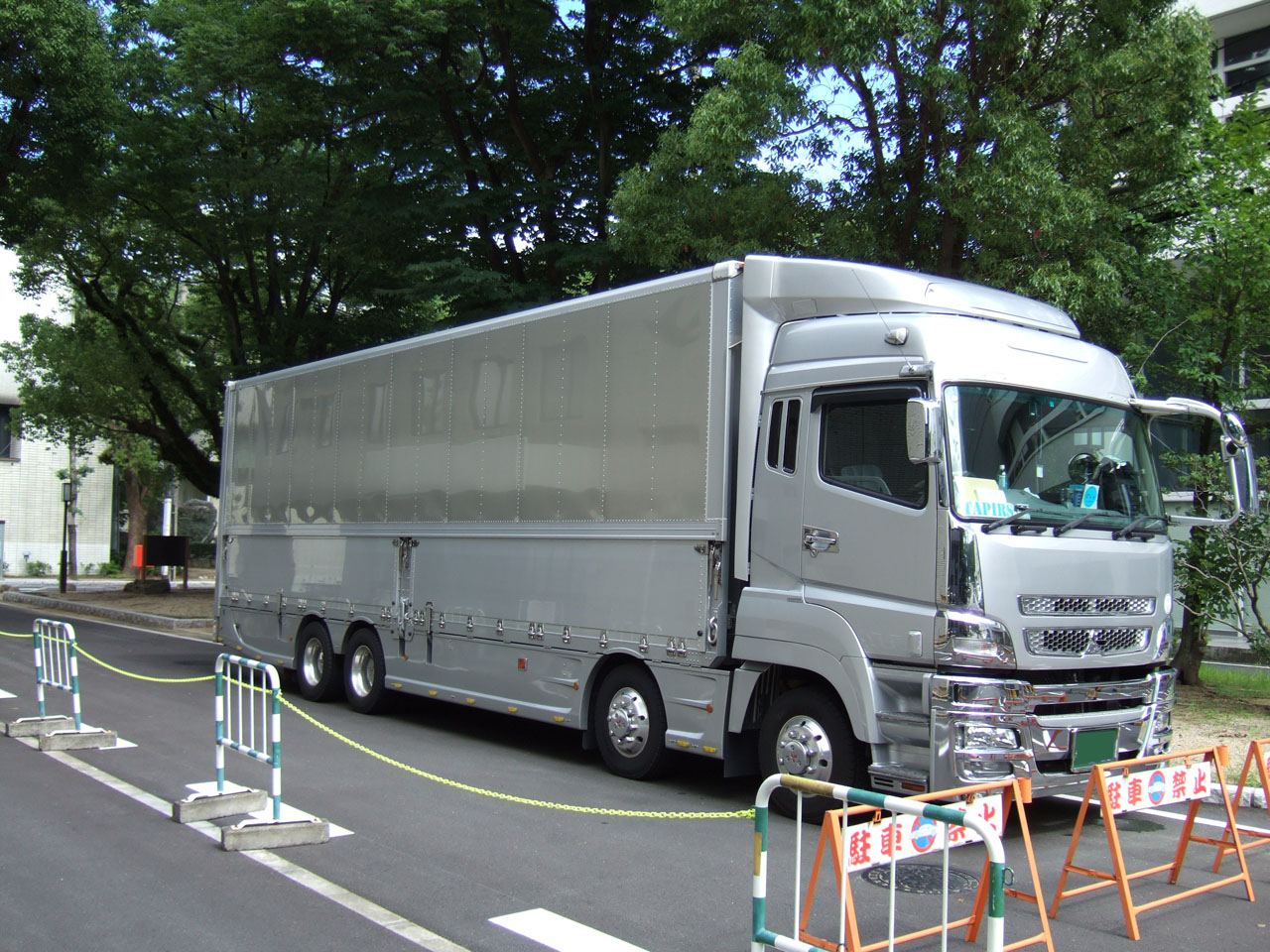 三菱ふそう・スーパーグレート（エアロパーツ装着車）